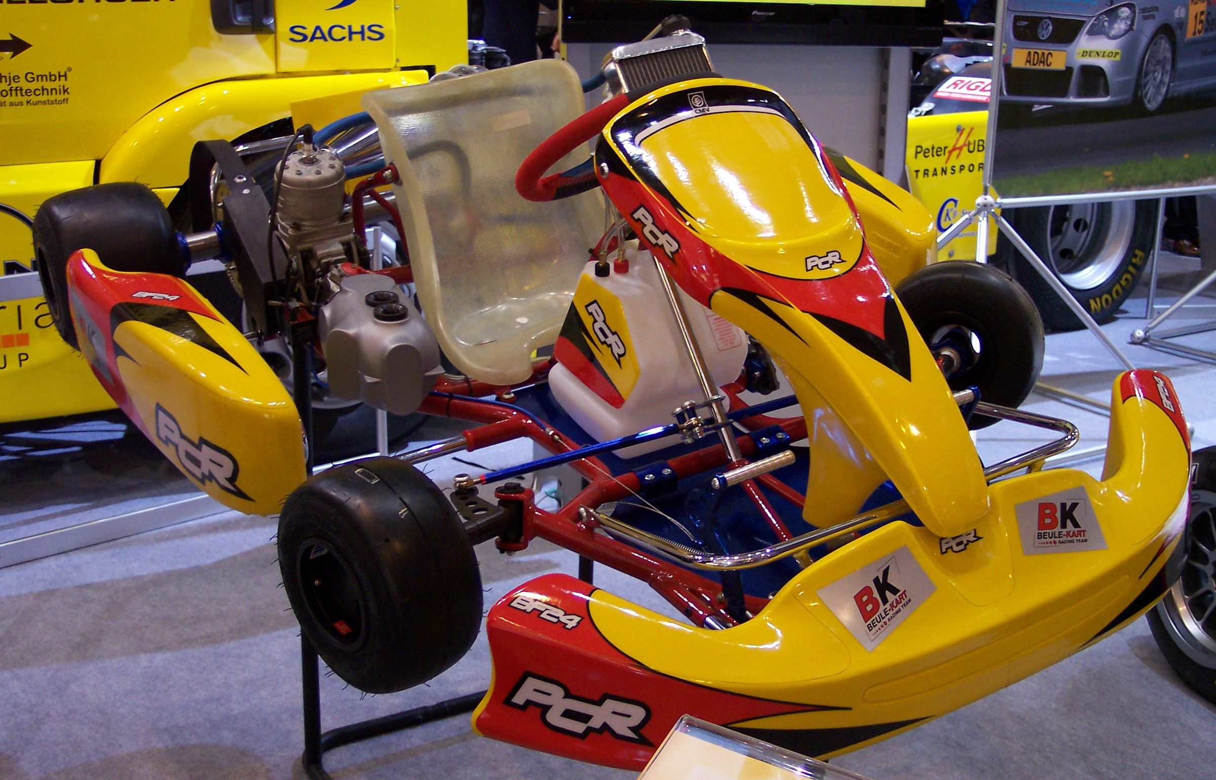 Description: Kart ADAC 2006 Source: Eigenes Bild